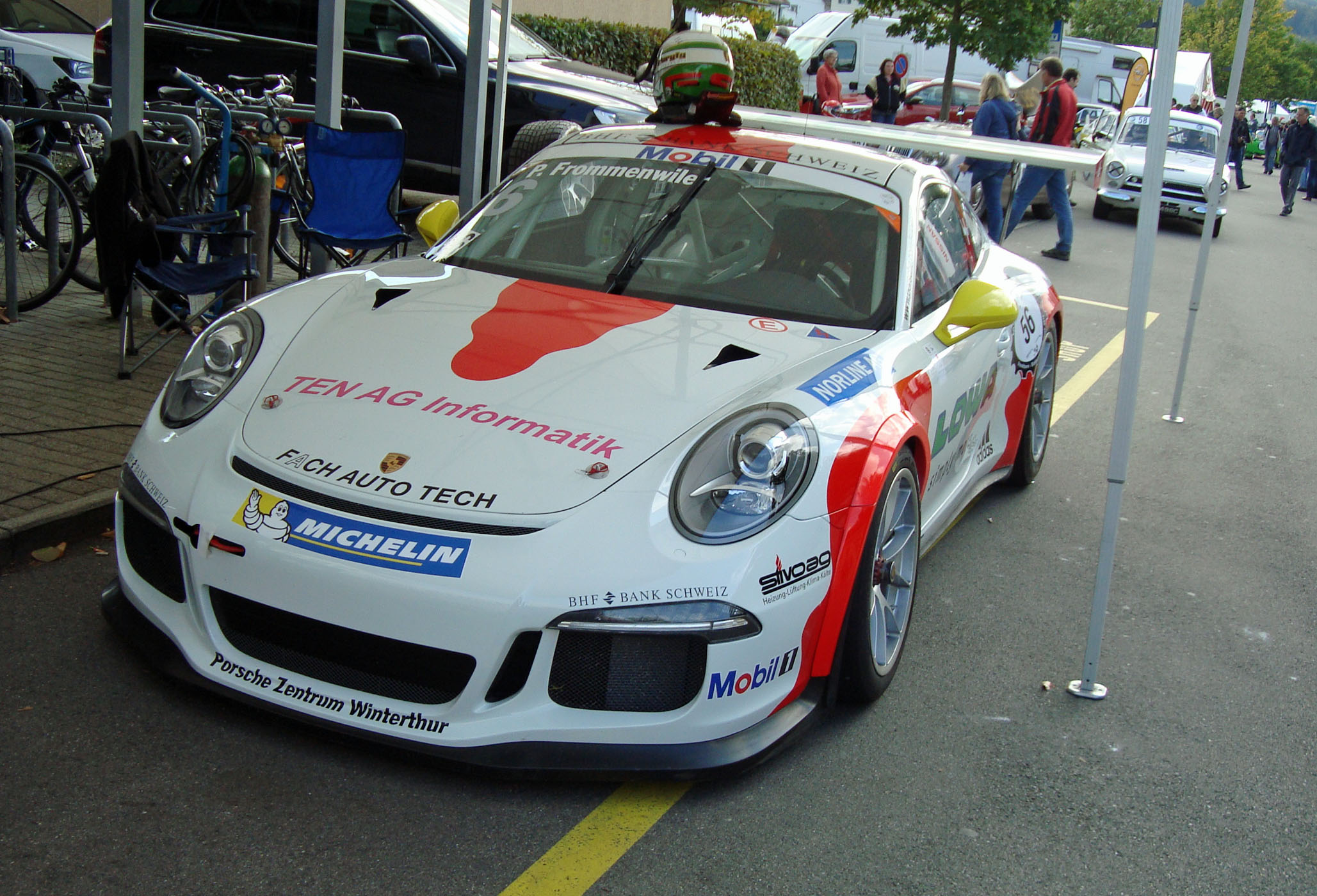 Porsche Supercup 2015, Porsche 911 GT3, Team Fach Auto Tech, Pilot Philipp Frommenwiler